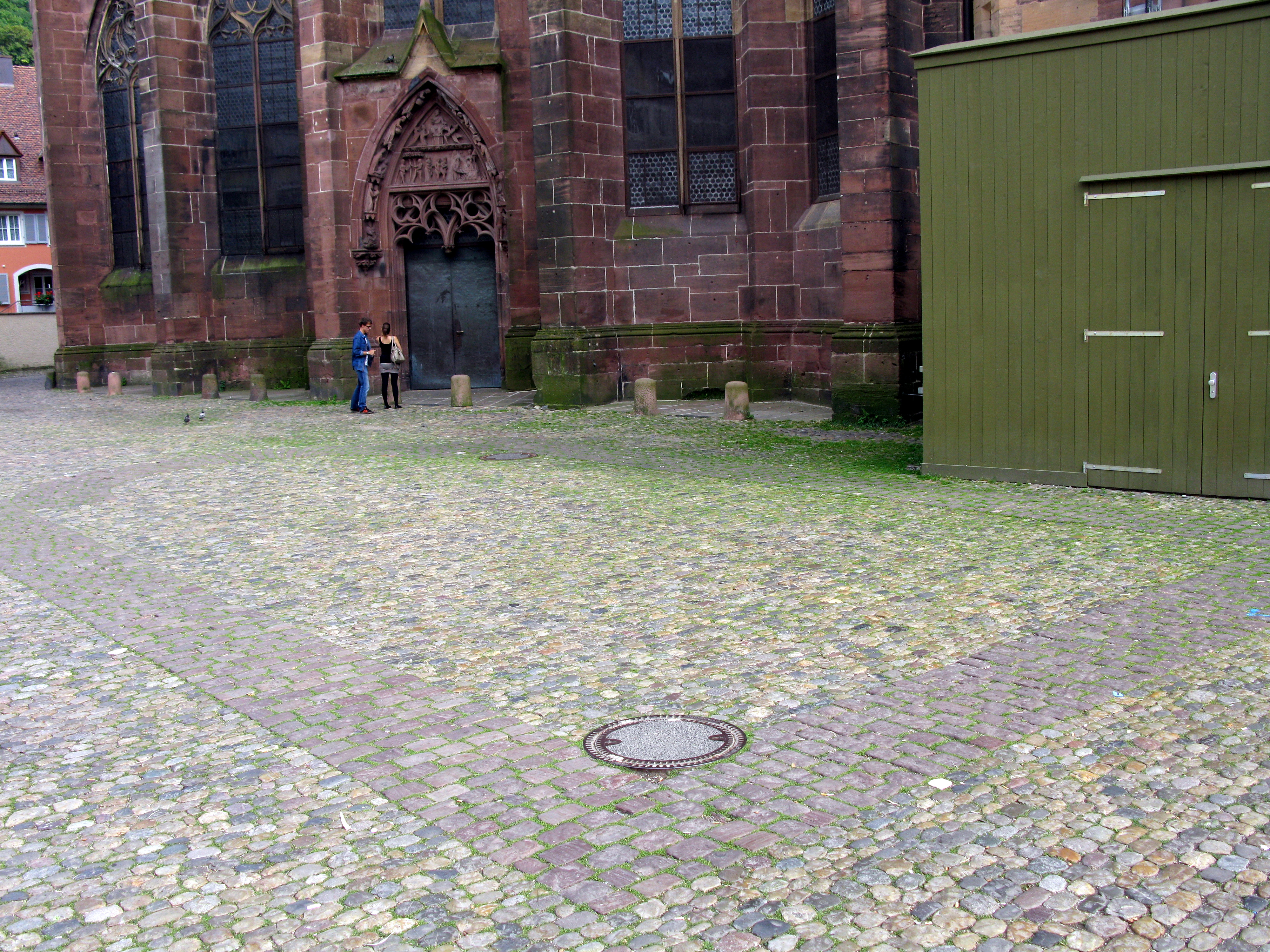 Grundriss der früheren Beinhauskapelle St. Andreas auf der Nordseite des Freiburger Münsterplatzes